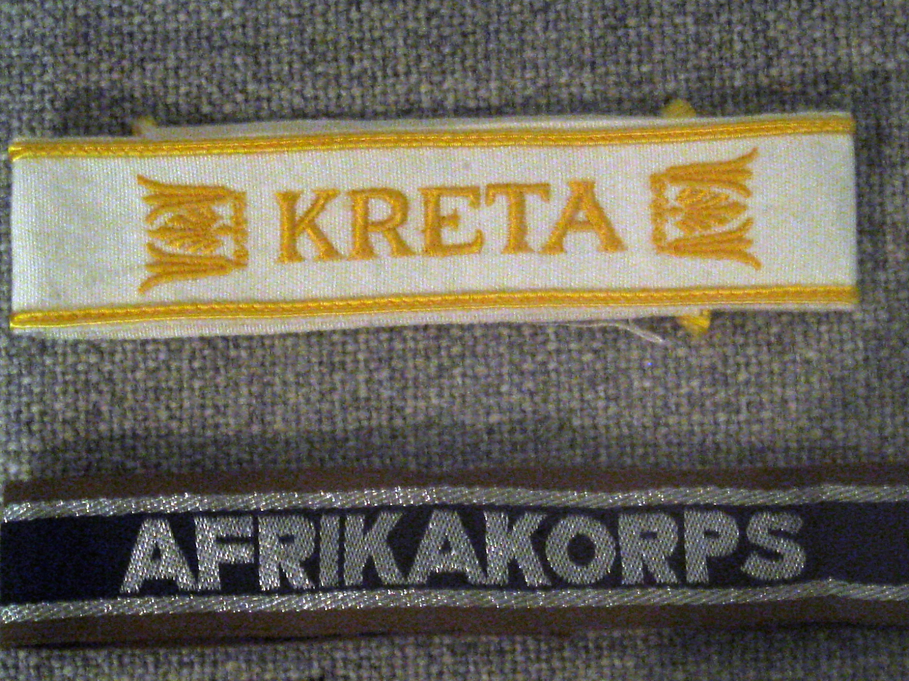 Ärmelband Kreta und Ärmelstreifen Afrikakorps im Festungsmuseum Reuenthal